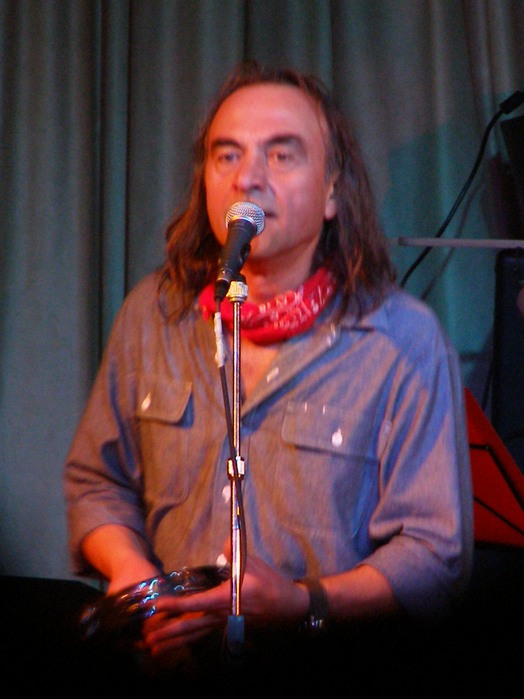 Nikos Papazoglou, Greek musician